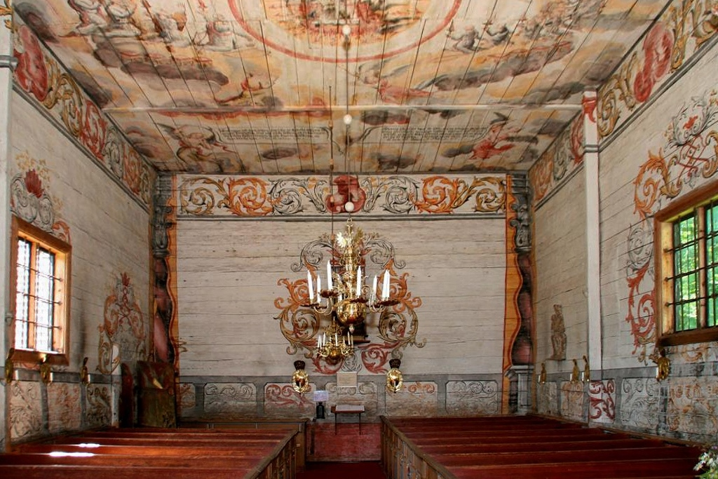 Foto: Tor Svensson